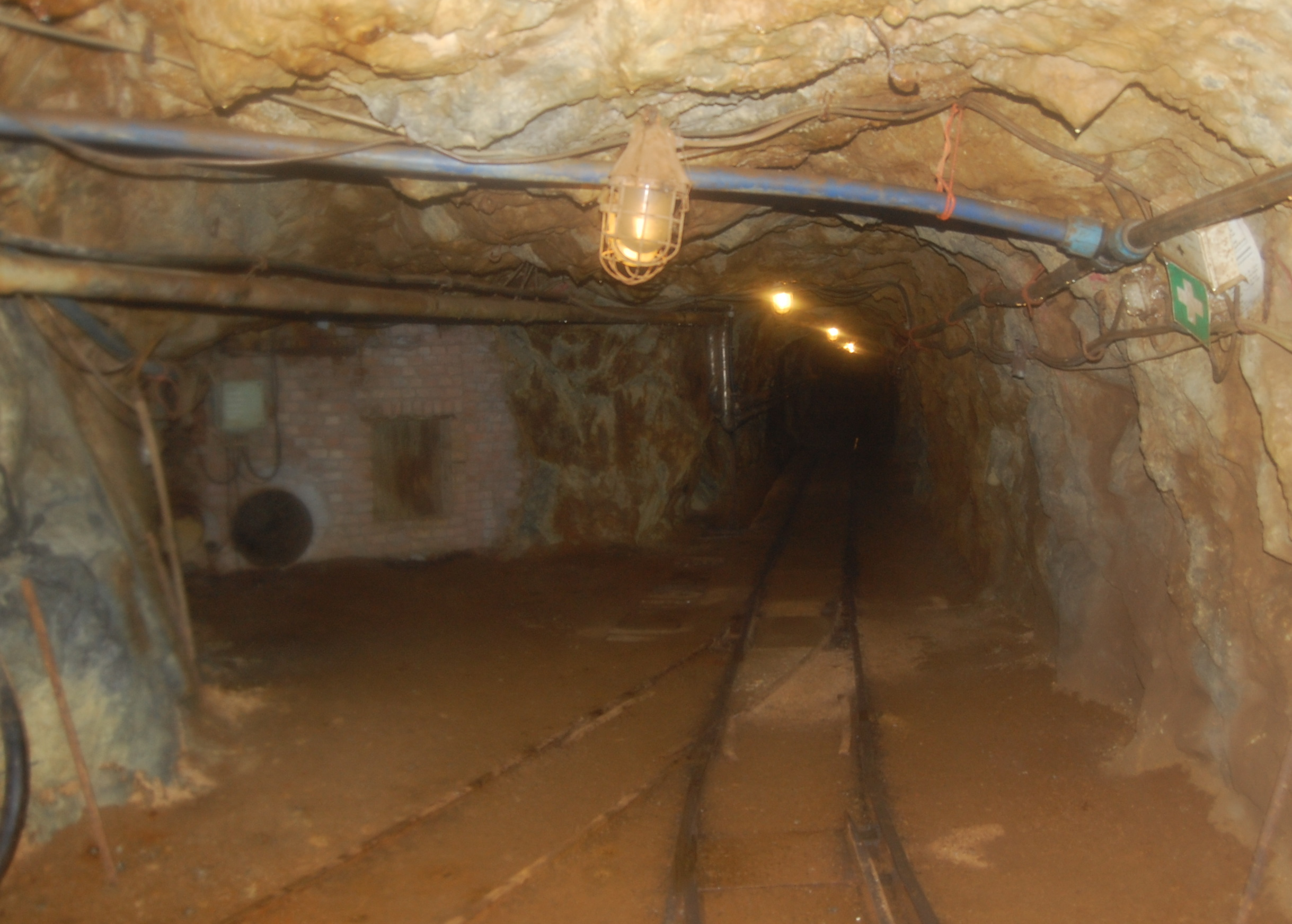 Stollen im Besucherbergwerk Drei Kronen und Ehrt